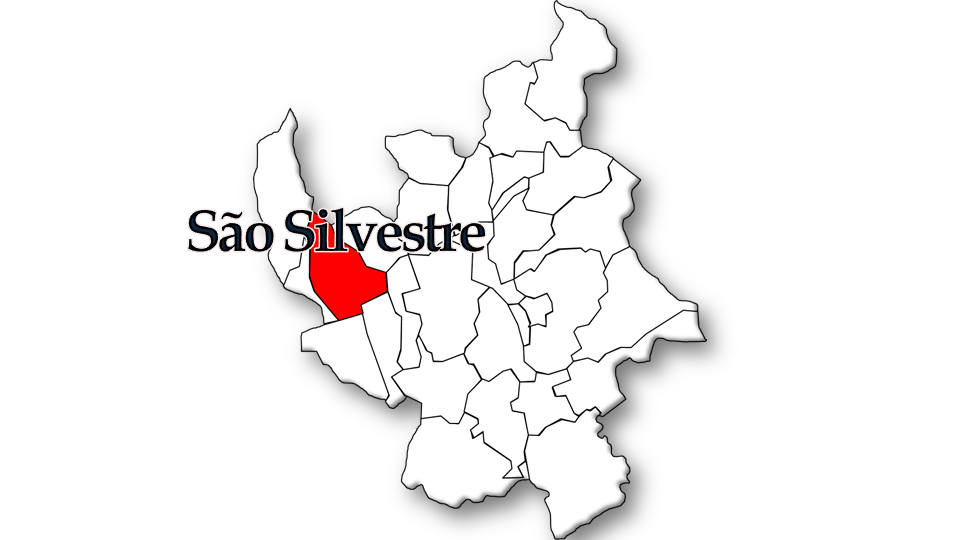 População